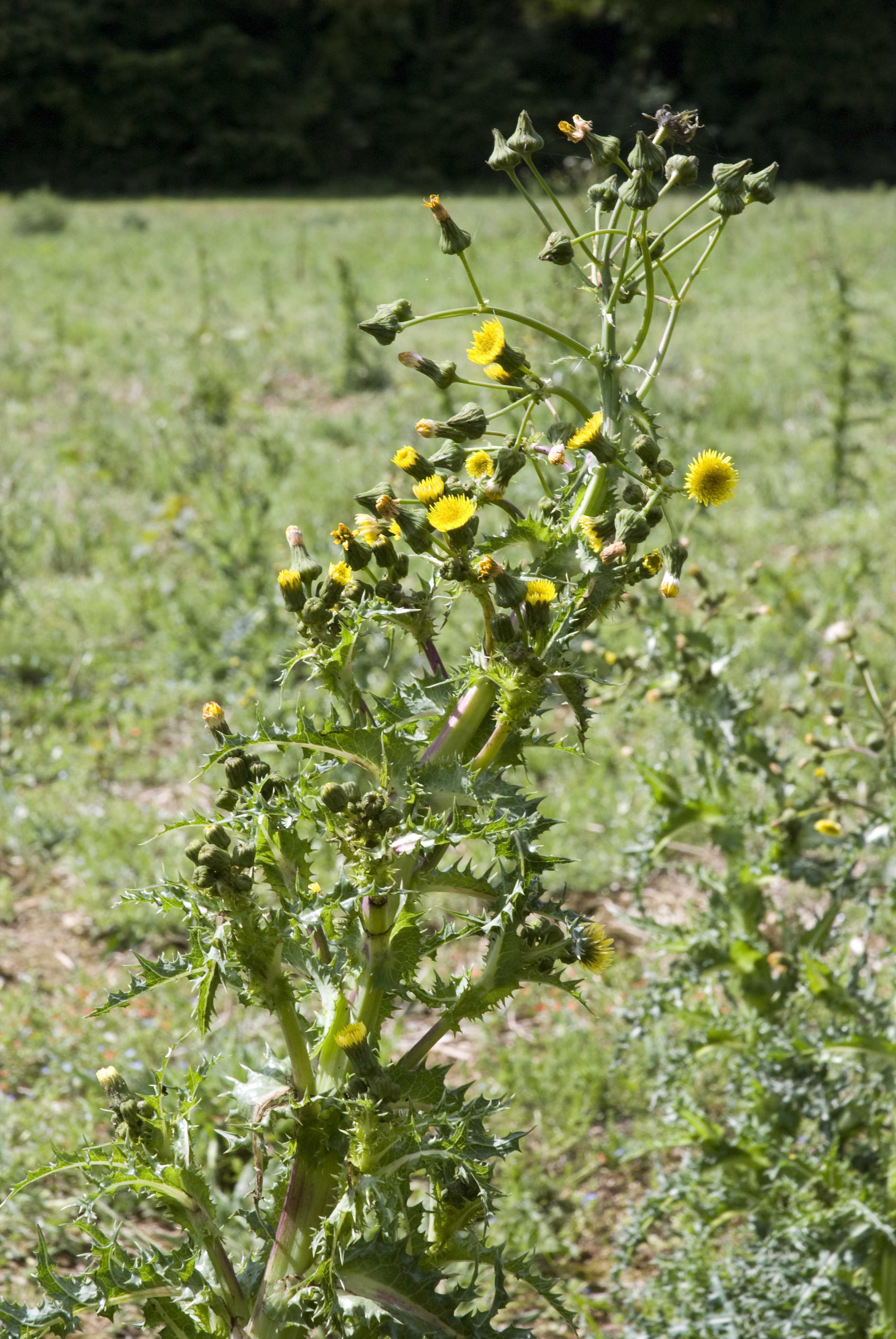 Sonchus asper Saint-Fuscien (Somme), France